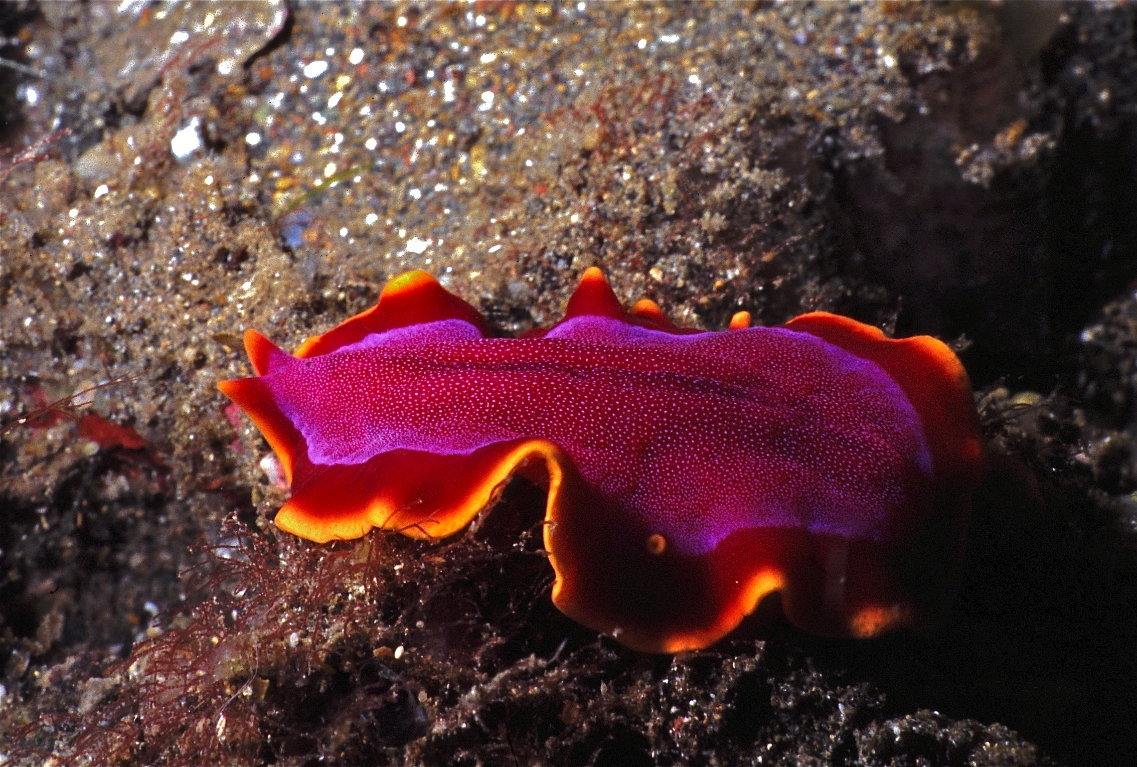 Bunaken, Sulawesi, INDONESIA